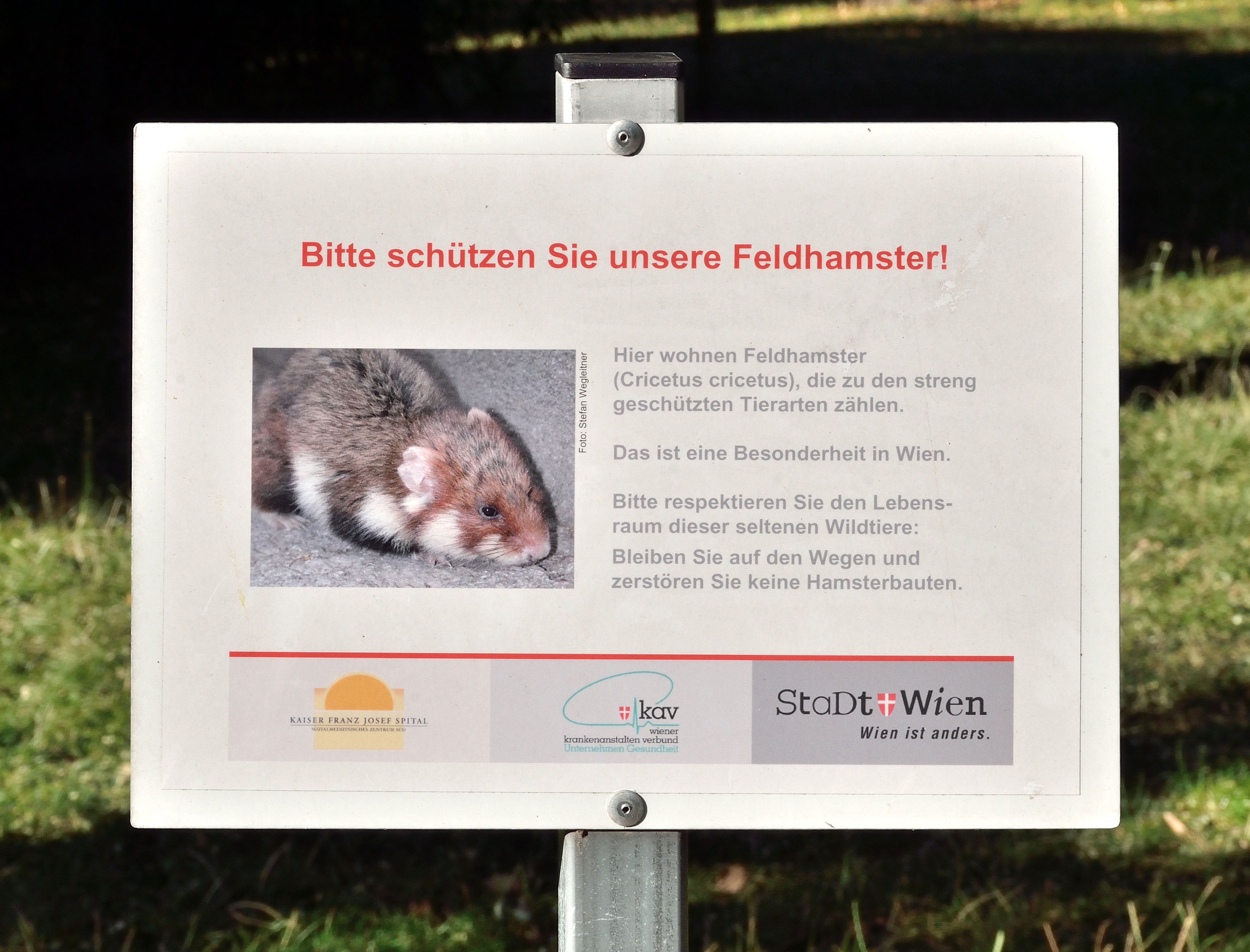 Sozialmedizinisches Zentrum Süd - Kaiser-Franz-Josef-Spital in Wien-Favoriten. Bitte schützen Sie unsere Feldhamster! Hier wohnen Feldhamster (Cricetus cricetus), die zu den streng geschützten Tierarten zählen. Das ist eine Besonderheit in Wien. Bitte respektieren Sie den Lebensraum dieser seltenen Wildtierer: Bleiben Sie auf den Wegen und zerstören Sie keine Hamsterbauten.